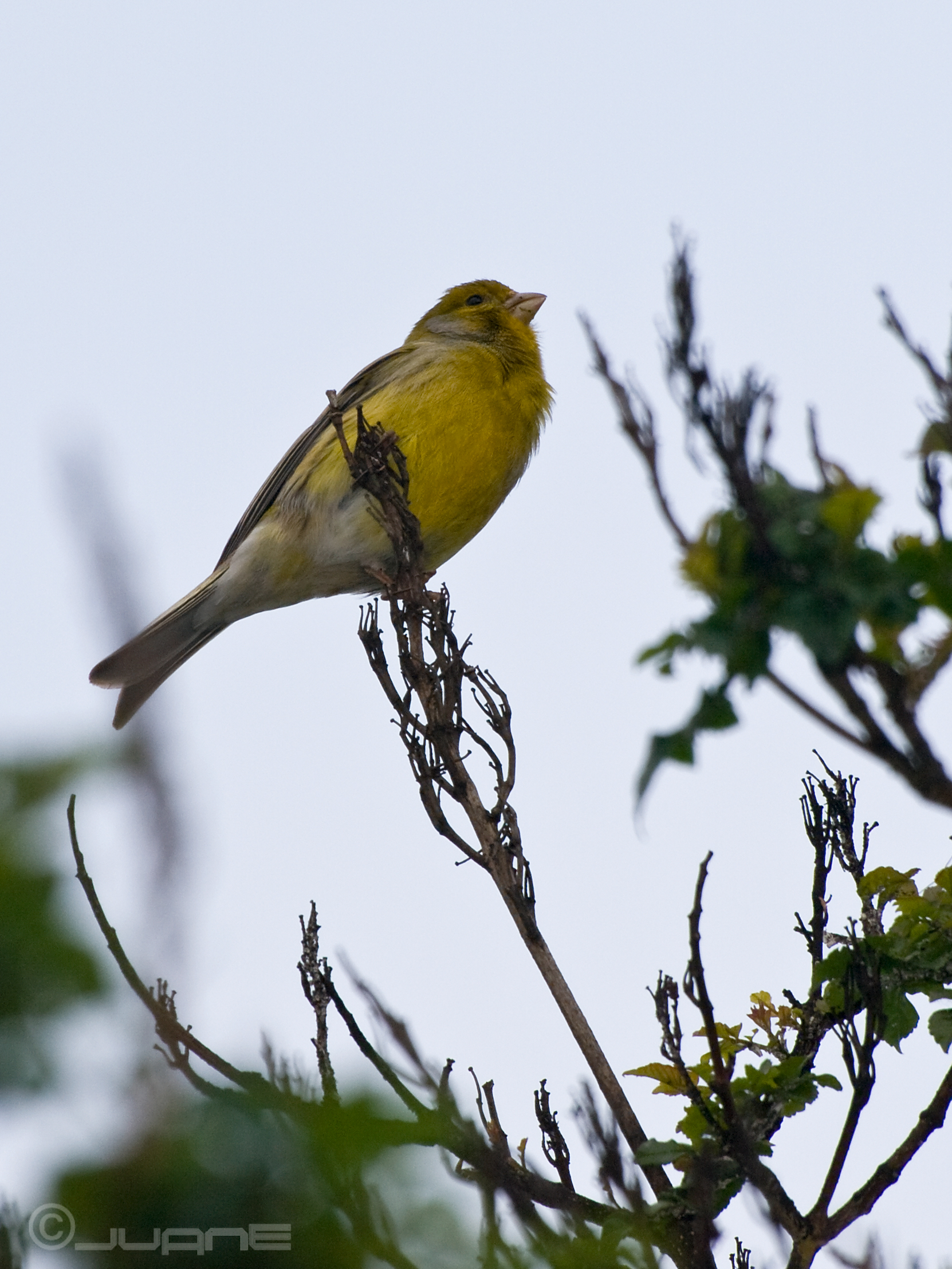 Barranco del Guiniguada, Las Palmas de Gran Canaria